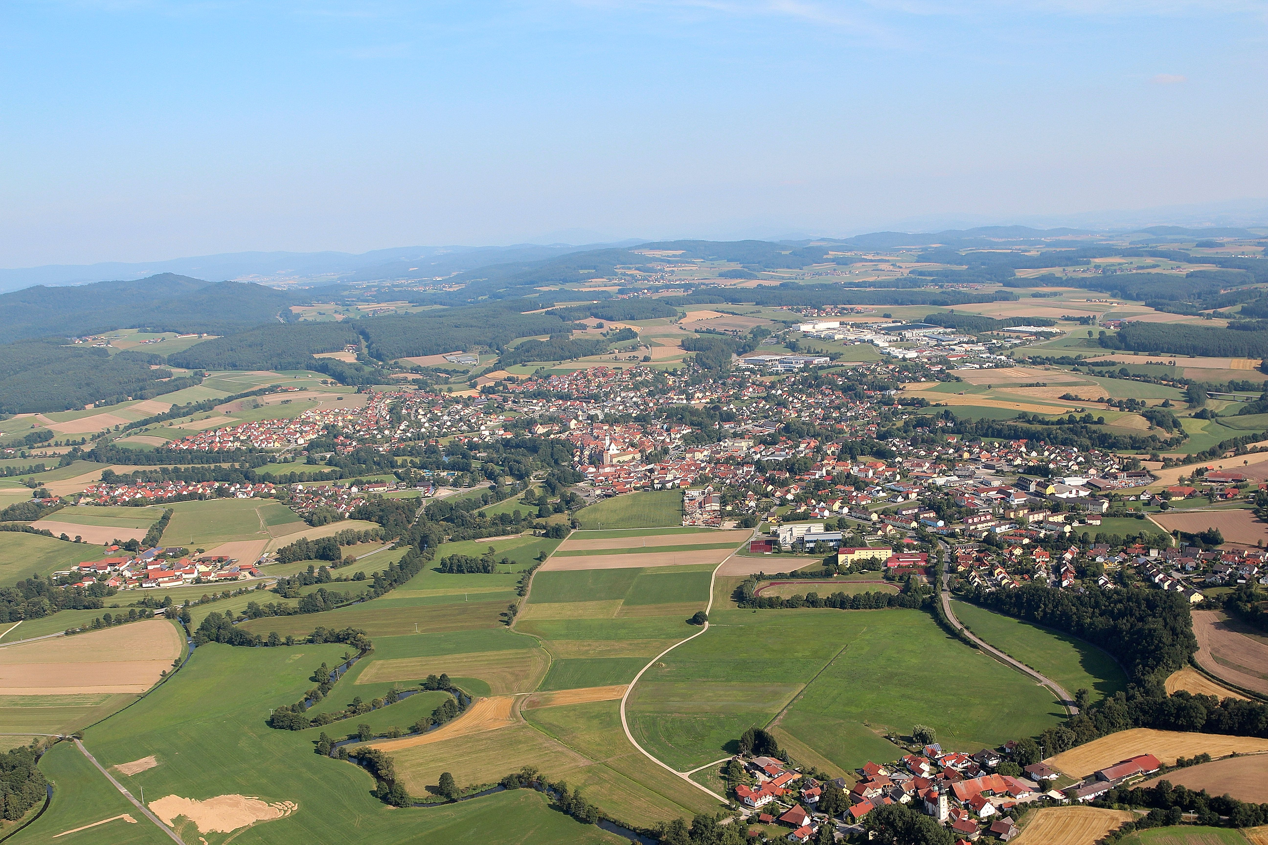 Neunburg vorm Wald, Landkreis Schwandorf, Oberpfalz, Bayern